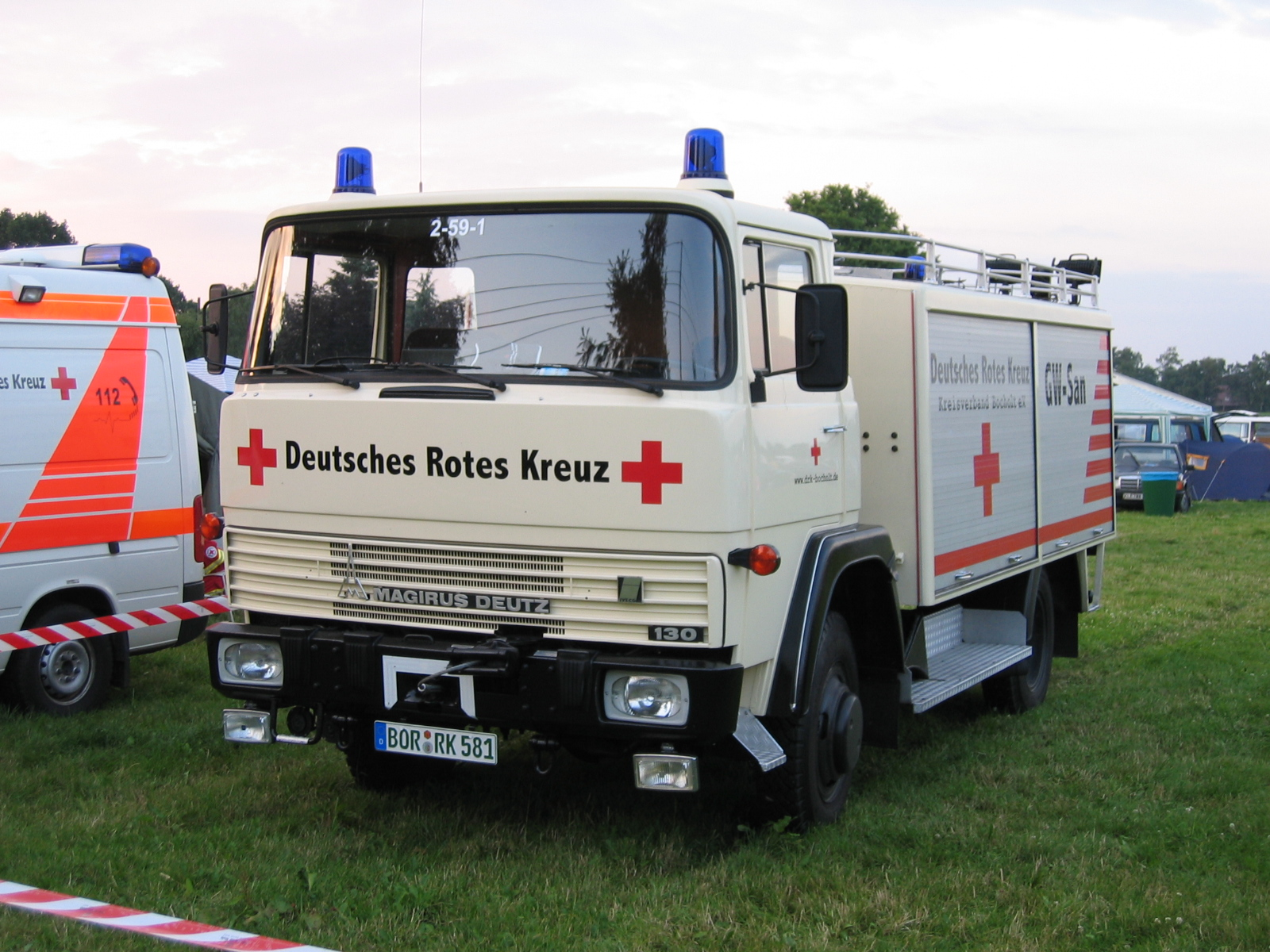 Gerätewagen Sanität (GW-SAN) des DRK Bocholt